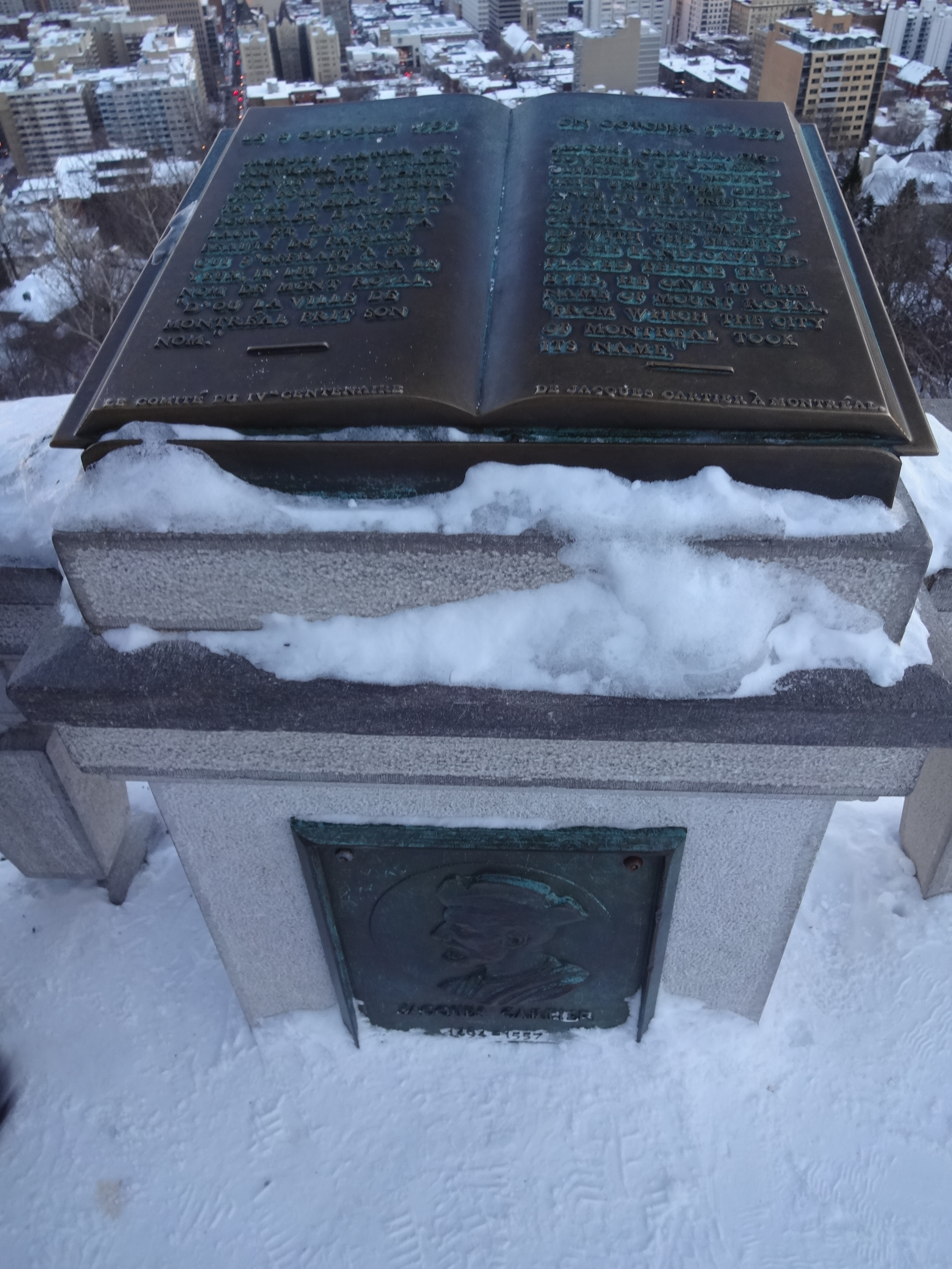 Monumento no Mount Royal.